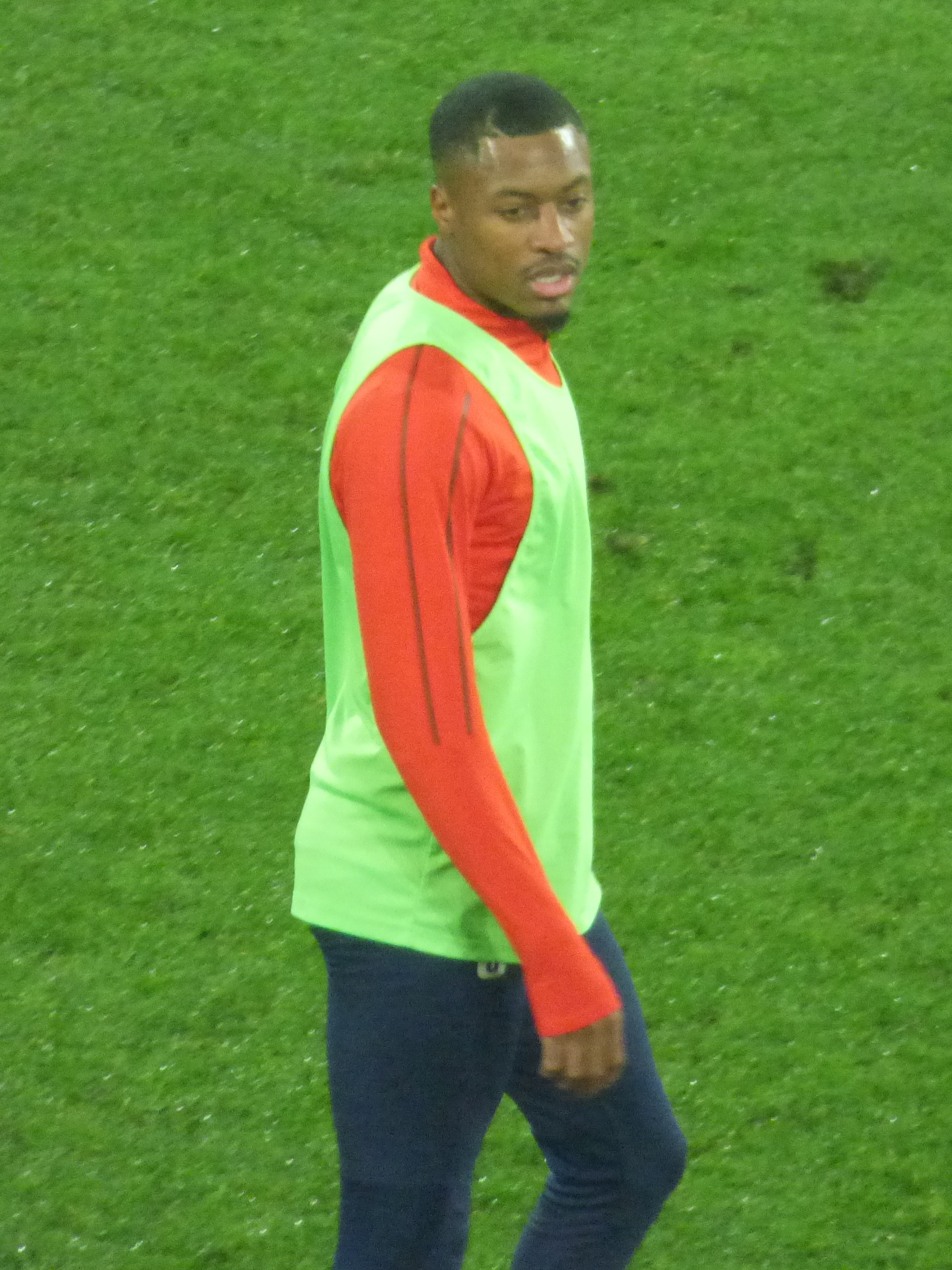 Mickaël Diakota avant le match RC Lens / AS Béziers, comptant pour la 23ème journée du championnat de France de football de Ligue 2 2018-2019, le 4 février 2019, au Stade Bollaert-Delelis.